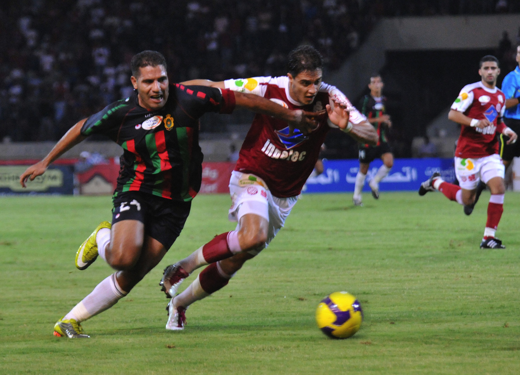 WAC vs FAR